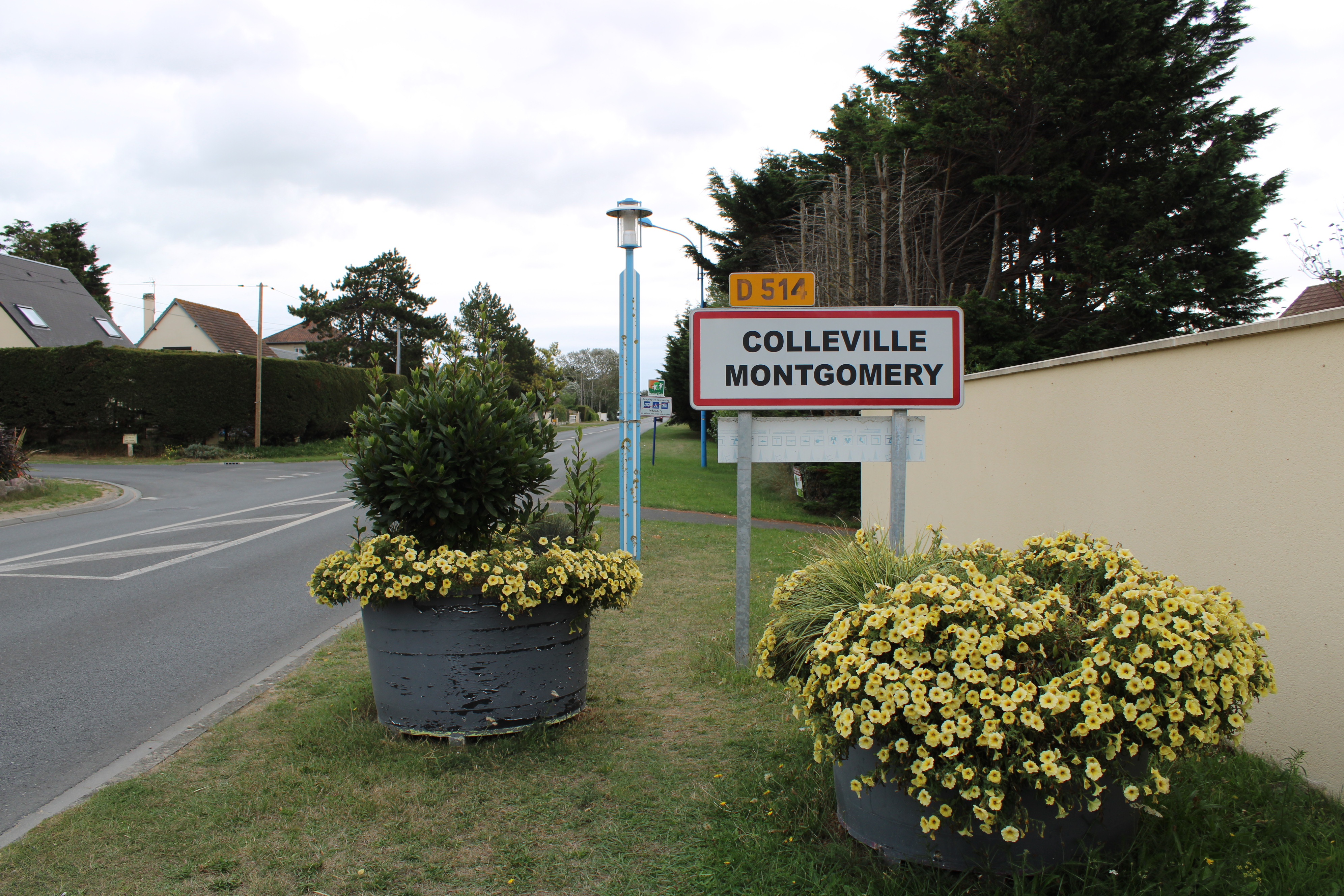 Entrée de la ville